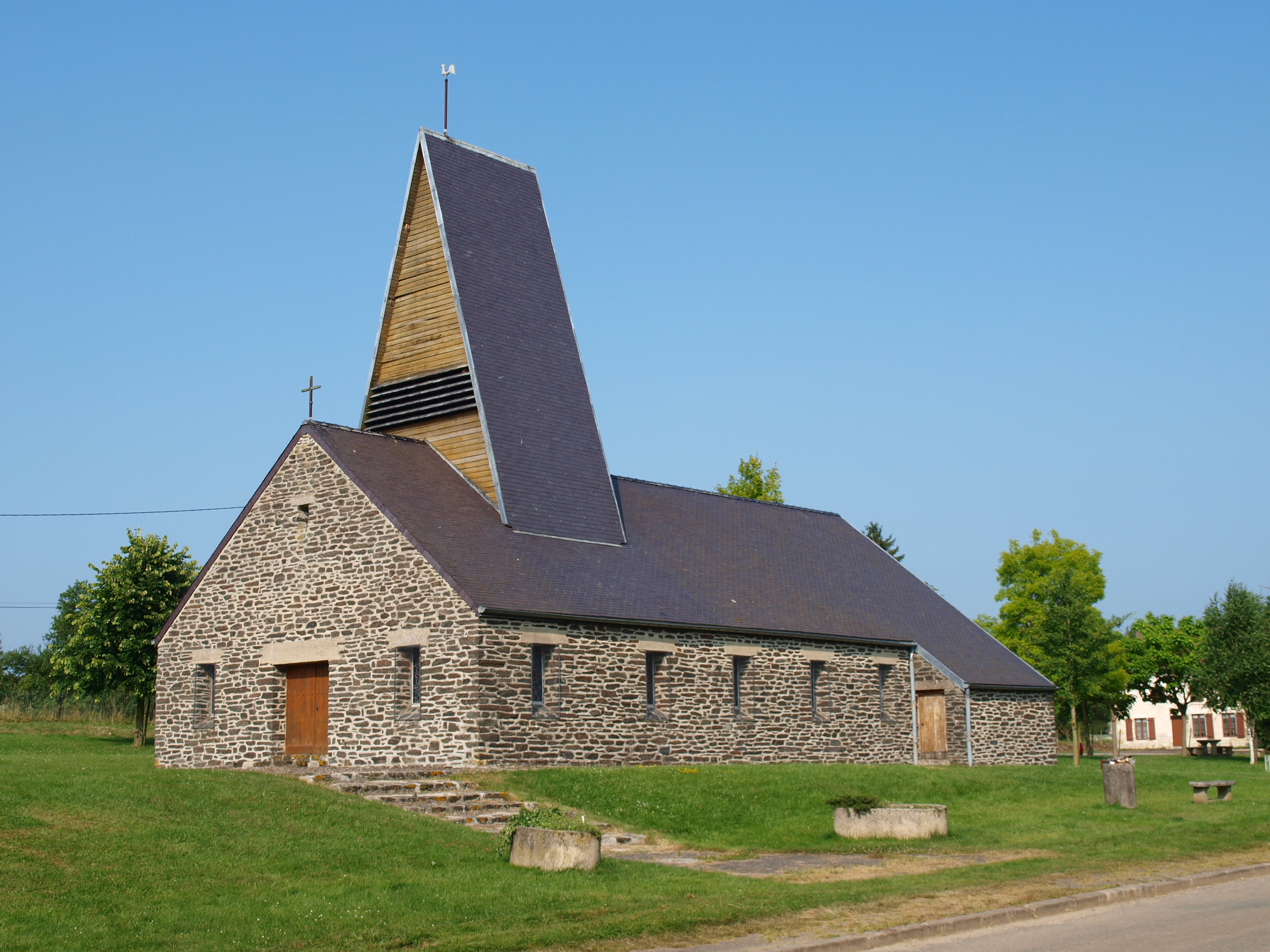 La Neuville-à-Maire (Ardennes, France) ; église